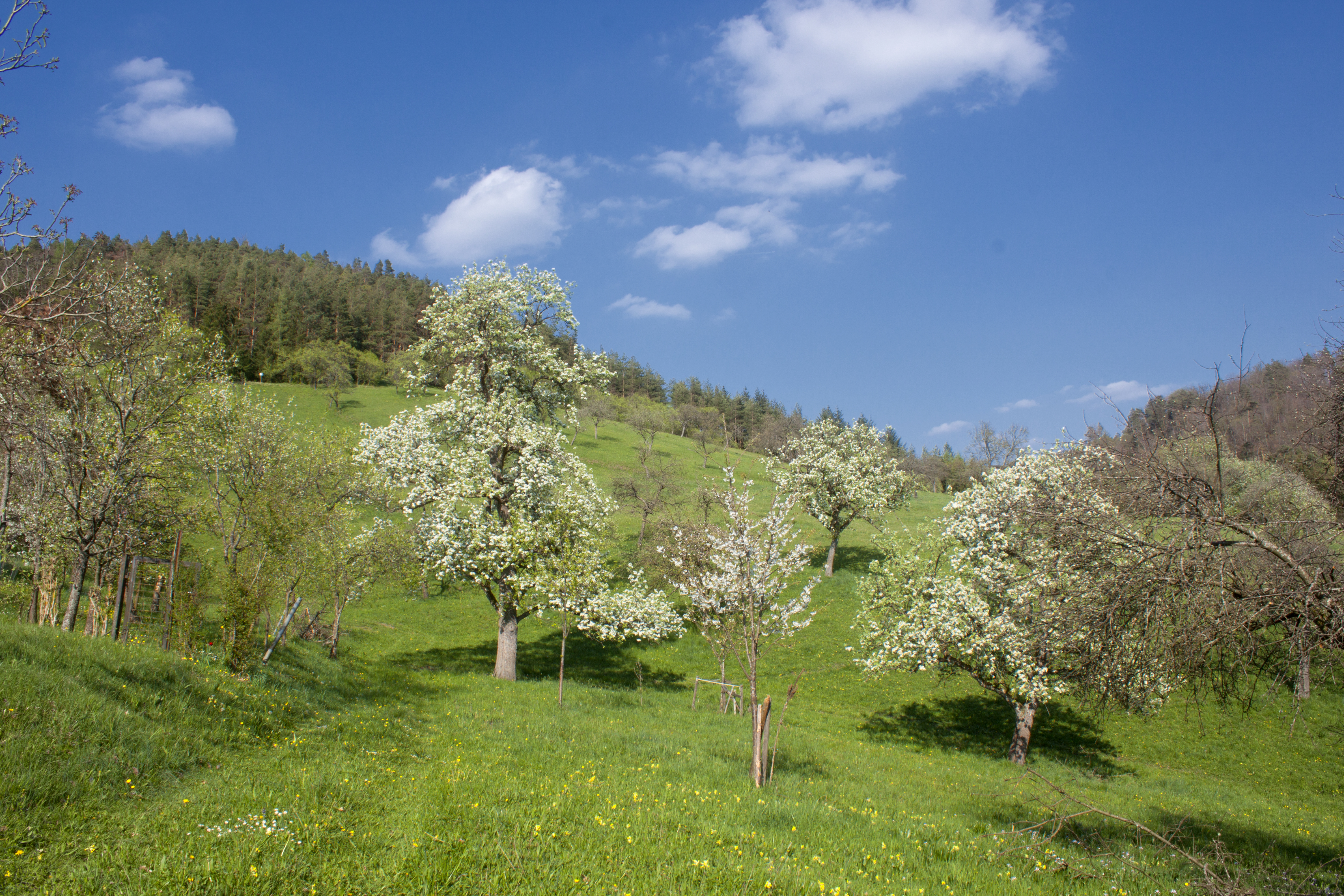 Blick hinauf zur "Hinteren Halde" -Espenloch